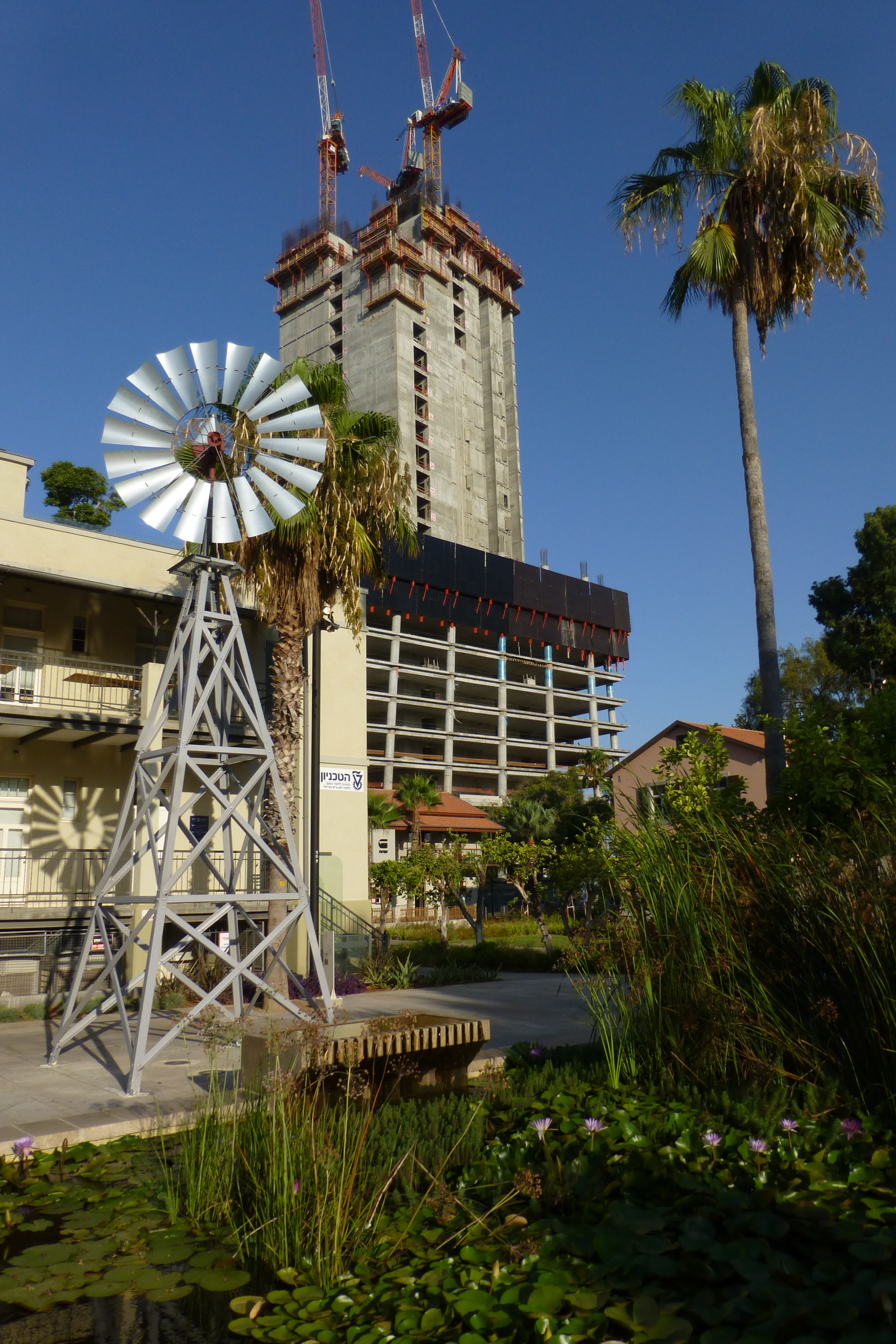 שׂרונה היא המושבה הרביעית שהקימו הגרמנים הטמפלרים בארץ ישראל במחצית השנייה של המאה ה-19. המושבה הוקמה ארבעה קילומטרים צפונית ליפו, ואחרוני בתיה שוכנים כיום בתל אביב בין שדרות שאול המלך מצפון, דרך בגין במזרח, רחוב הארבעה מדרום, ומגרשי החנייה של אחוזות החוף ממערב. מקצתם נמצאים היום בתוך בסיס הקריה.